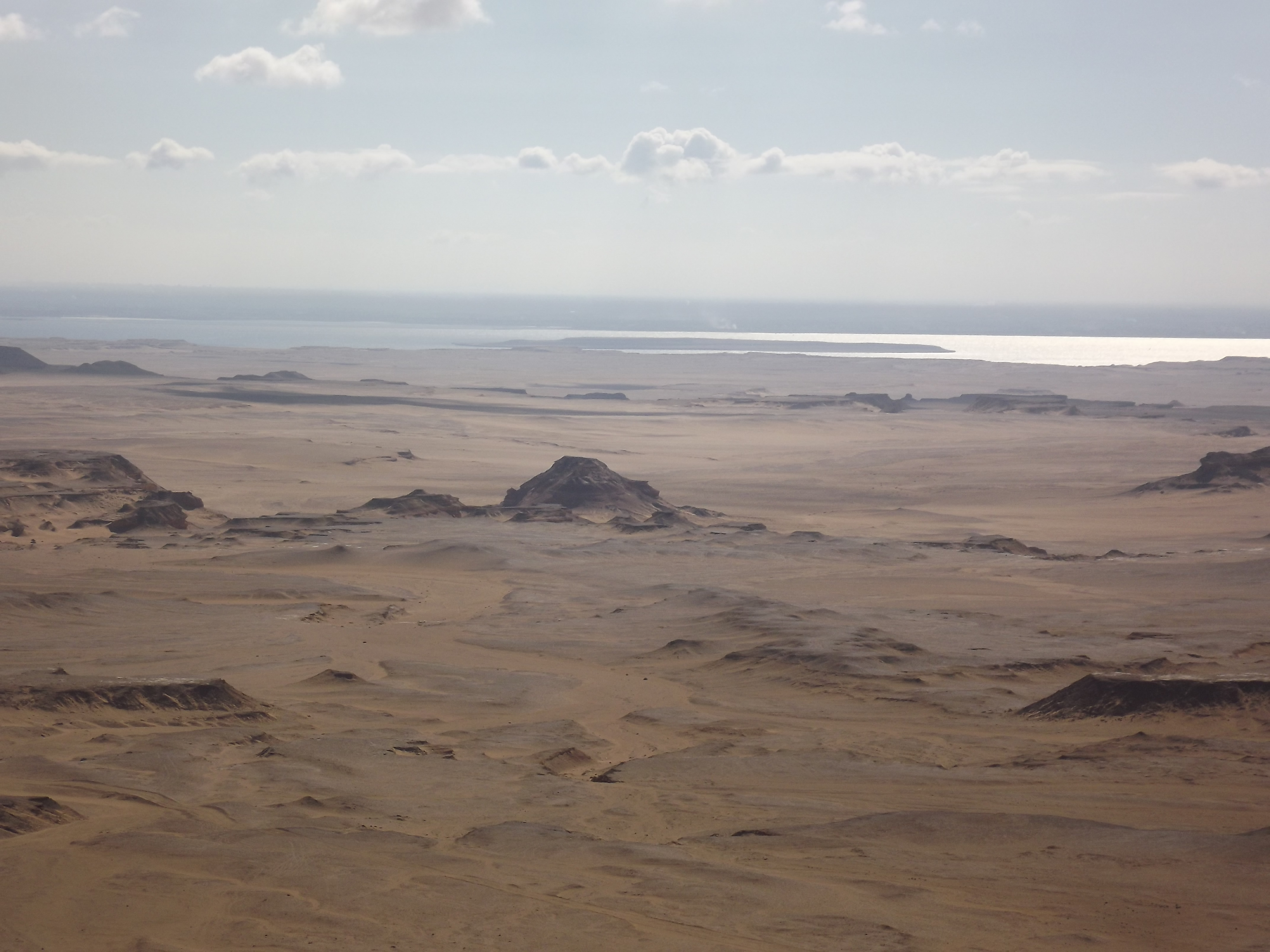 محمية قارون - الفيوم